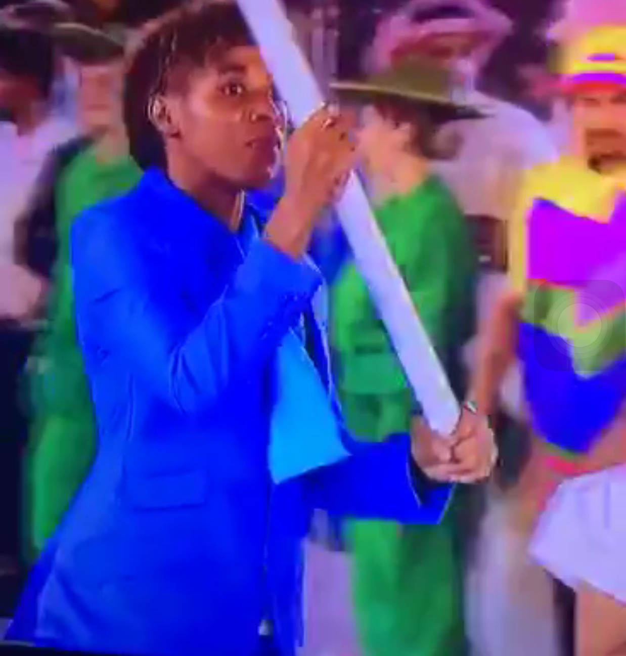 Rosa tenant le drapeau congolais aux j.o de rio 2016